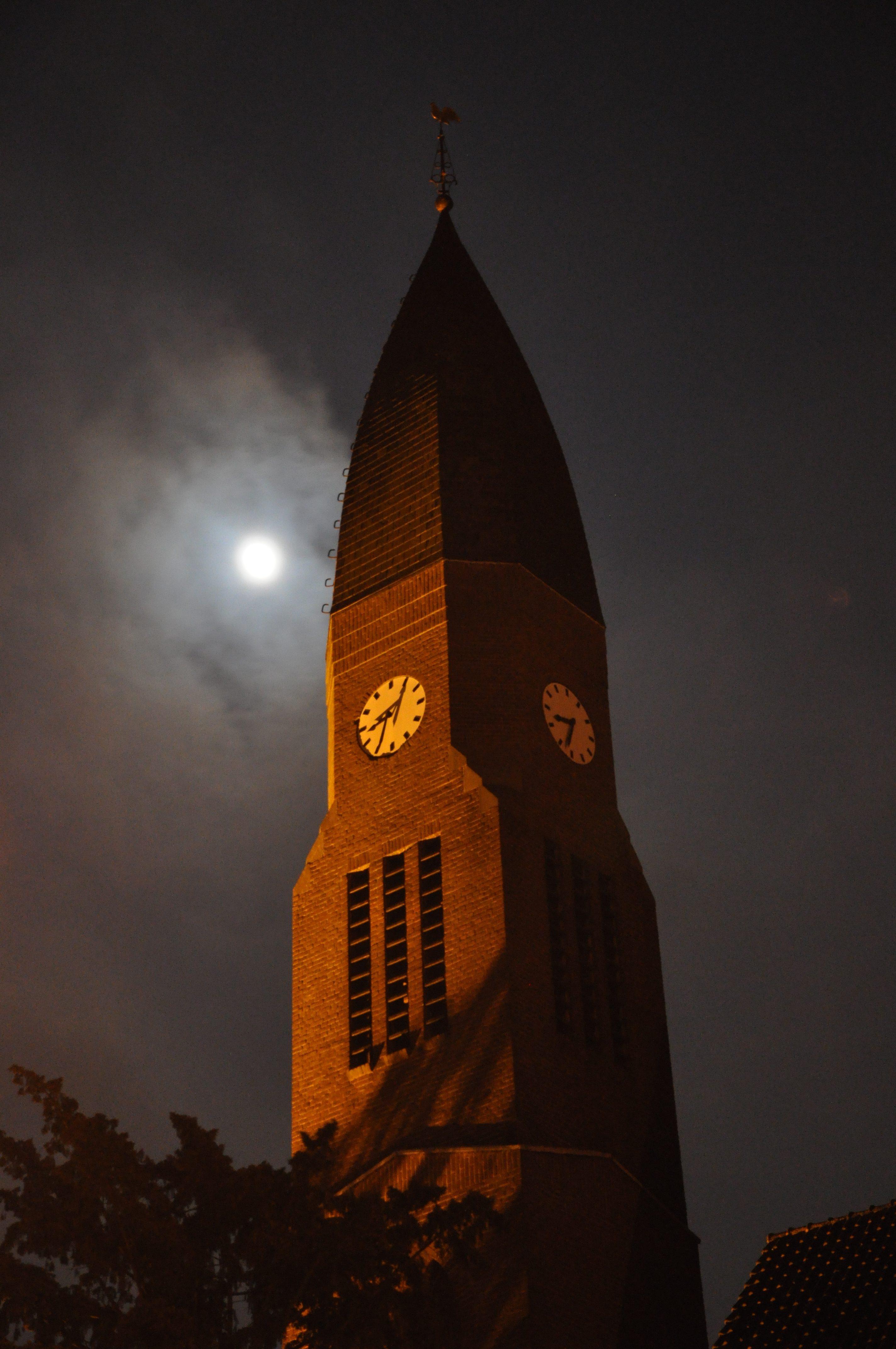 De Opstandingskerk in Woerden bij nacht, met o pde achtergrond de volle maan.